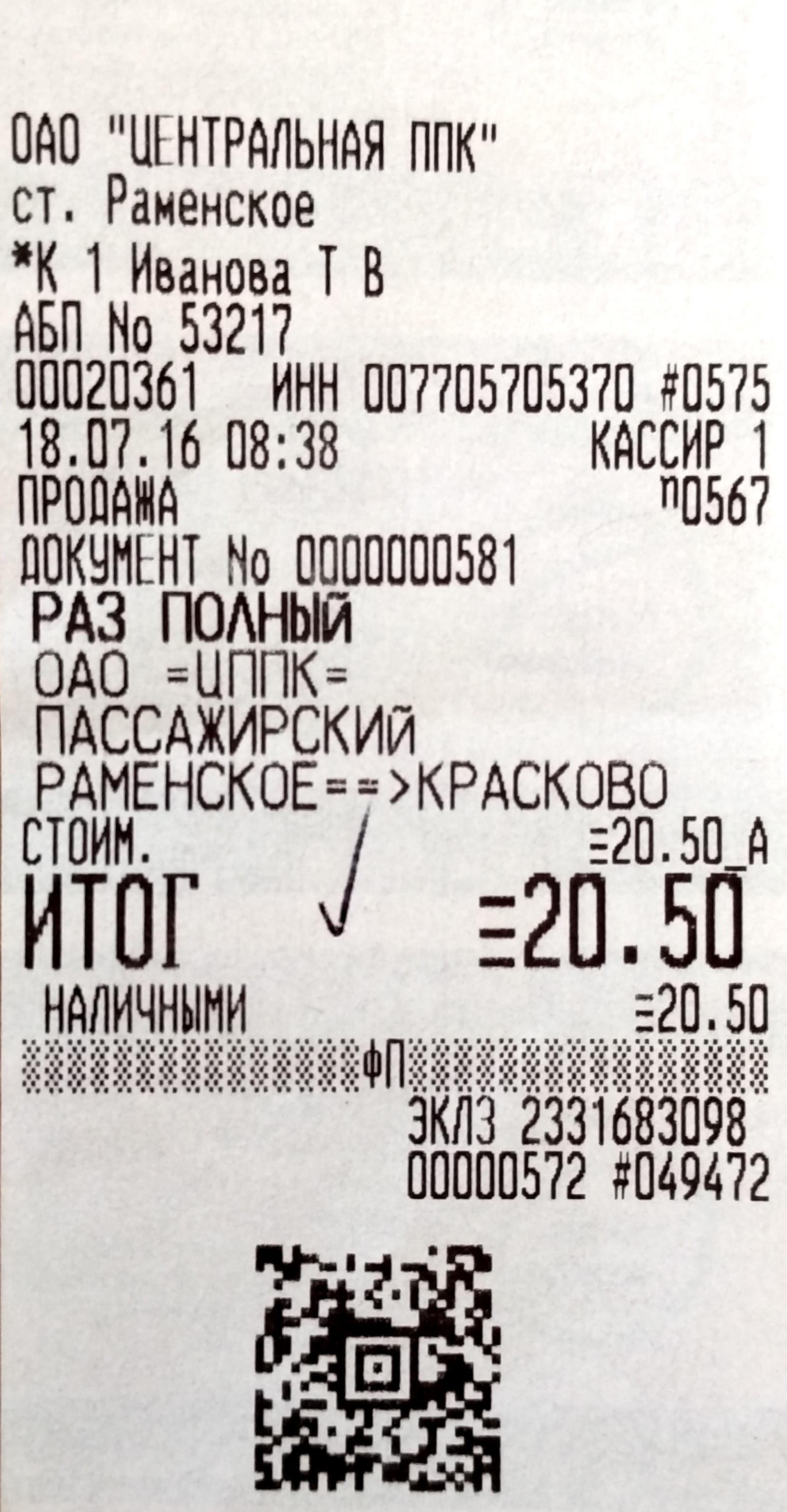 Разовый билет пригородного железнодорожного сообщения ОАО "Центральная ППК" Казанской железной дороги.